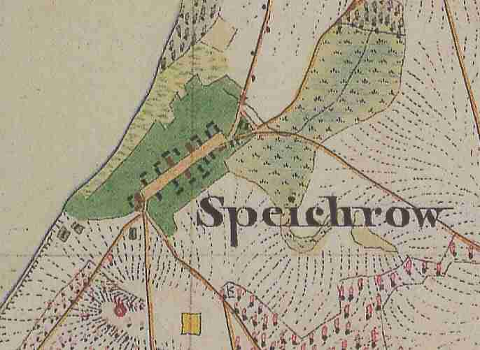 Speichrow, Ortsteil der Gemeinde Schwielochsee, Landkreis Dahme-Spreewald, Brandenburg, Deutschland, Ausschnitt aus dem Urmesstischblatt 3951 Trebatsch von 1846